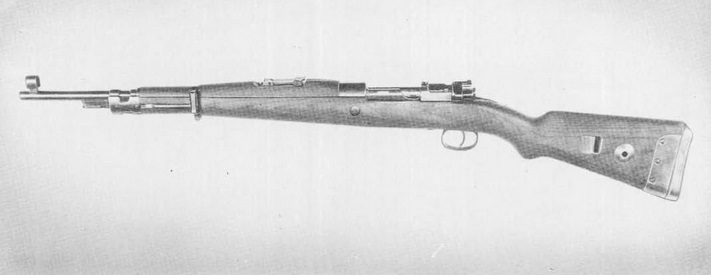 Carabine Gewehr 33/40 (cal. 7,92 mm)